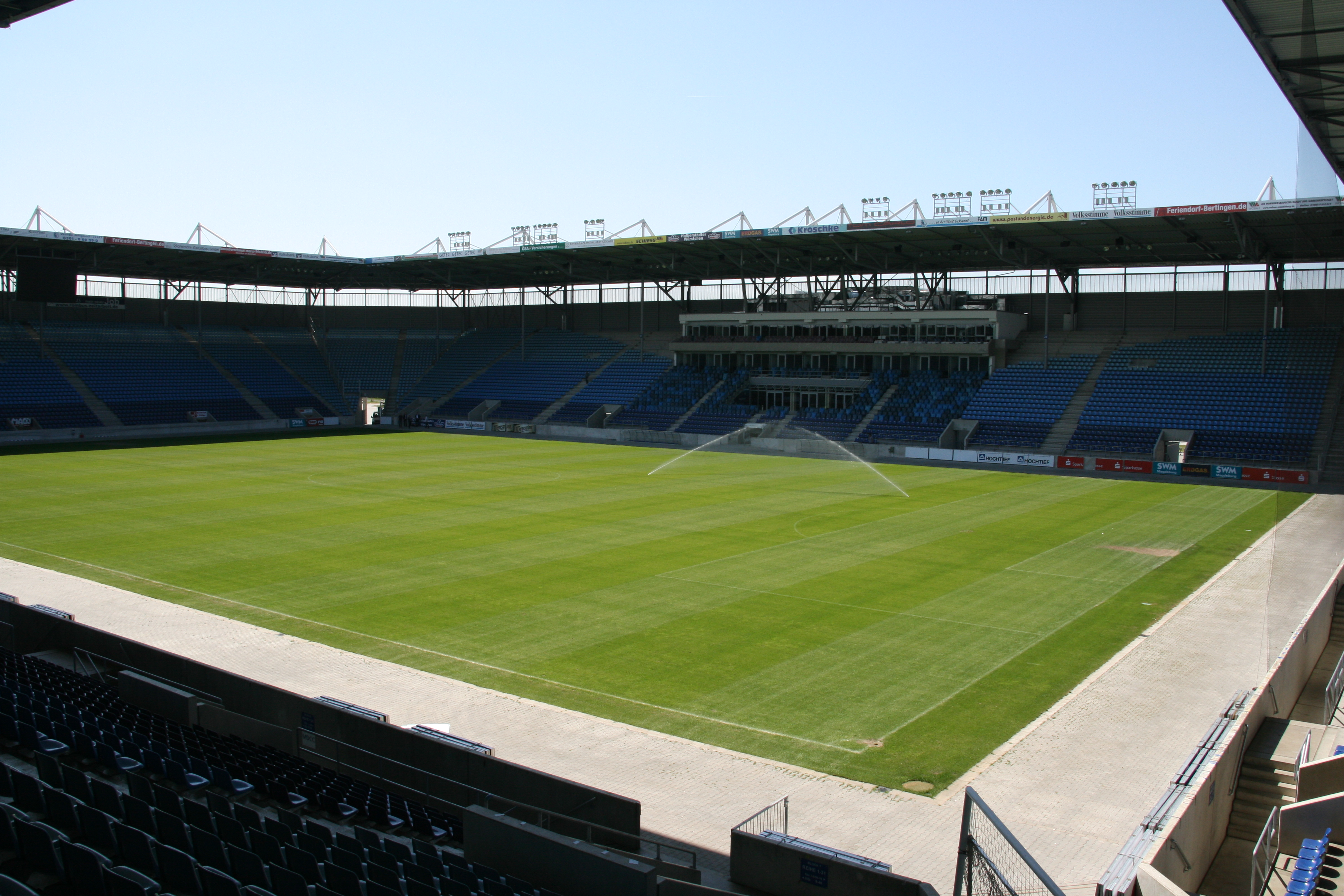 Haupttribüne des Stadions Magdeburg